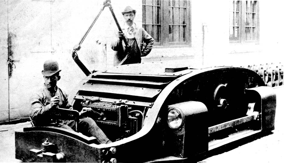 Two-ton electric mining locomotive, 1895